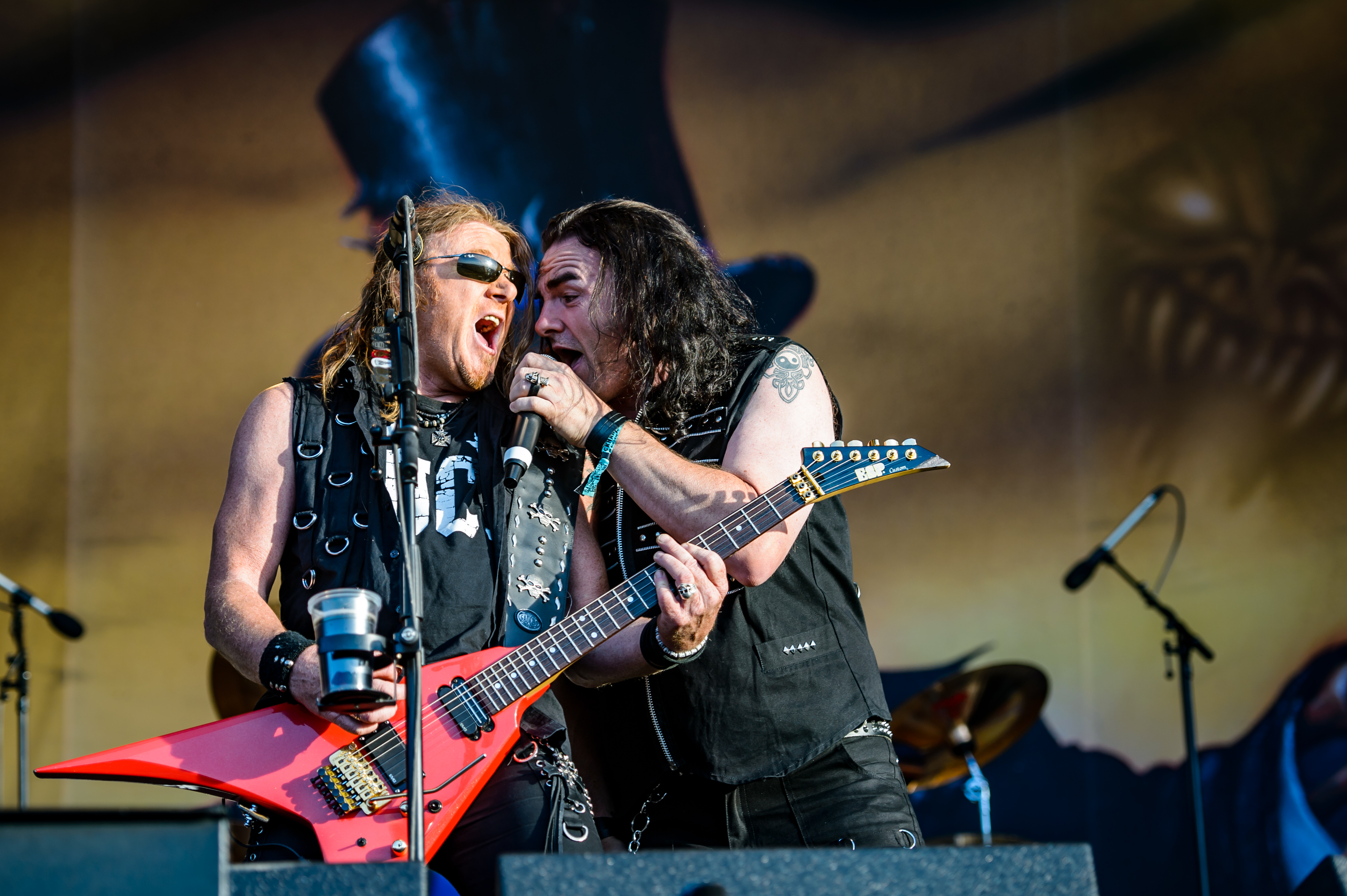 'RockHarz Open Air 2016; Ballenstedt': 'Gamma Ray'